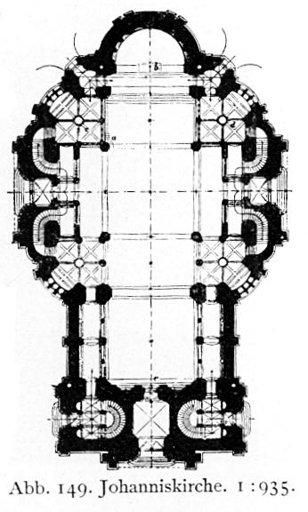 Johanneskirche an der Berliner Allee in Düsseldorf, 1881, Architekten Walter Kyllmann und Adolf Heyden, Grundriss.jpg